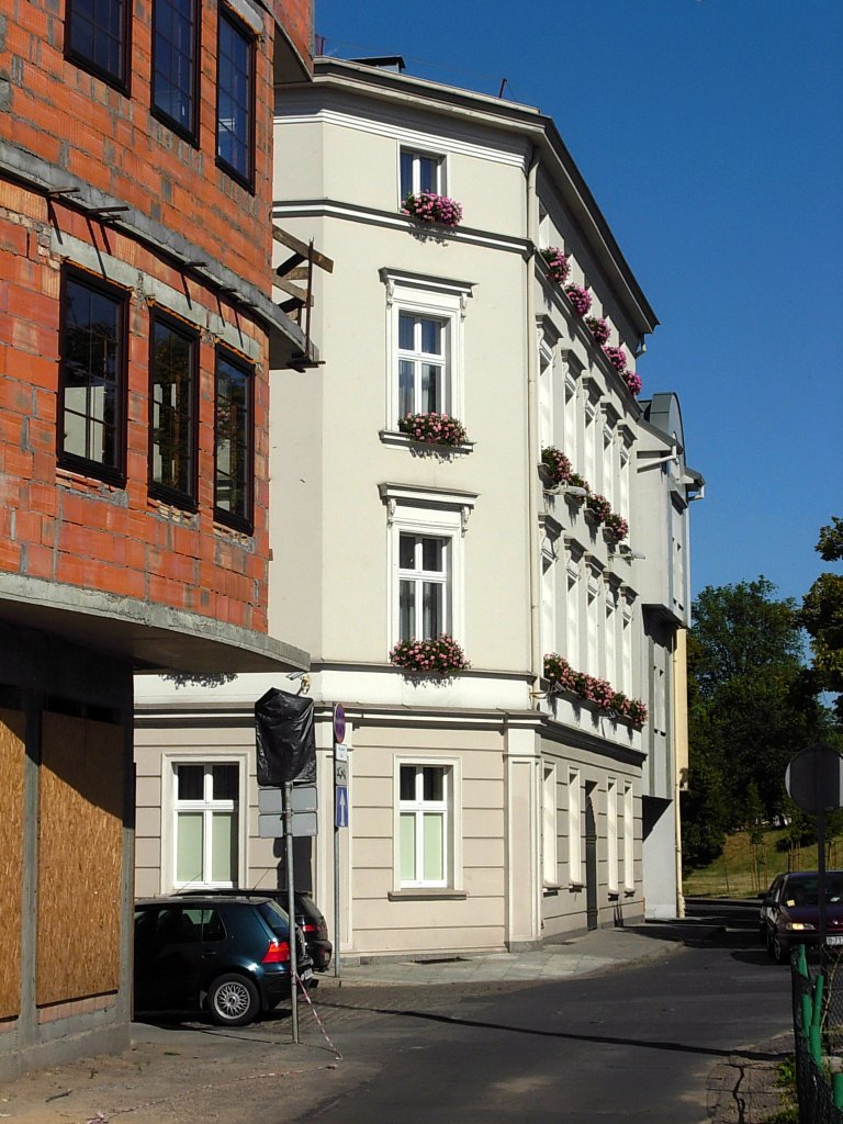 Ulica Pod Blankami w Bydgoszczy